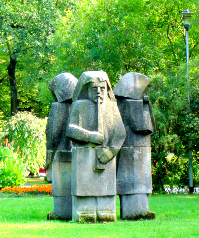 Koszalin, pomnik Muzykantów autorstwa Zygmunta Wujka w parku przed Amfiteatrem